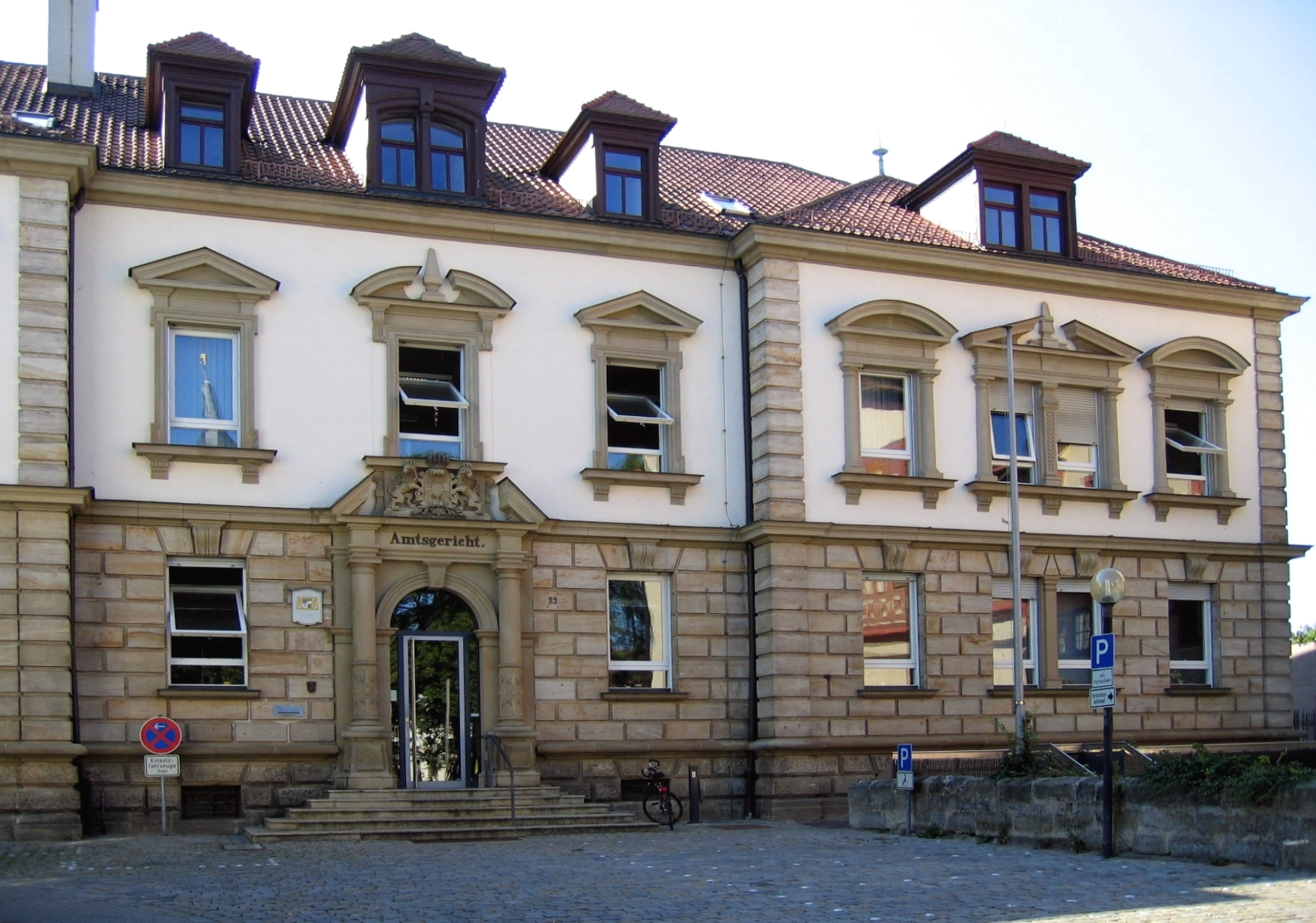 Description: Gebäude des Amtsgerichts, Kapellenstraße 14-15 in Forchheim (Germany) Source: selbst fotografiert Date: 7. Sept. 2005 Author: Bubo